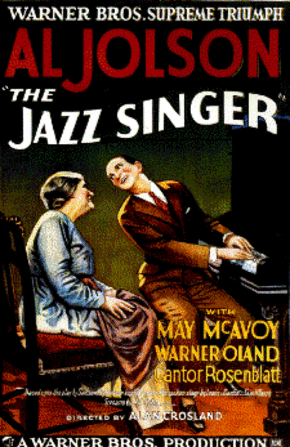 Description: Faible résolution du poster du film Le Chanteur de jazz (1927) avec Eugenie Besserer et Al Jolson Propriétaires: Warner Bros. Source: Empire Arts Center Why PD : The image was published as an advertisement in the U.S. in 1927. There is no evidence that copyright notice was originally filed on the image, as then required. For instance, this image evidently shows the entire poster and no copyright notice. A search of copyright renewal records for 1954 and 1955 ([1], [2], [3], [4]) reveals no evidence that Warner Bros. renewed copyrights to this poster or any collection of posters or any collection of material that might encompass this poster as would have been required to maintain copyright protection, if any. There is no evidence that Warner Bros. or its parent company, Time Warner, claims copyright on the image